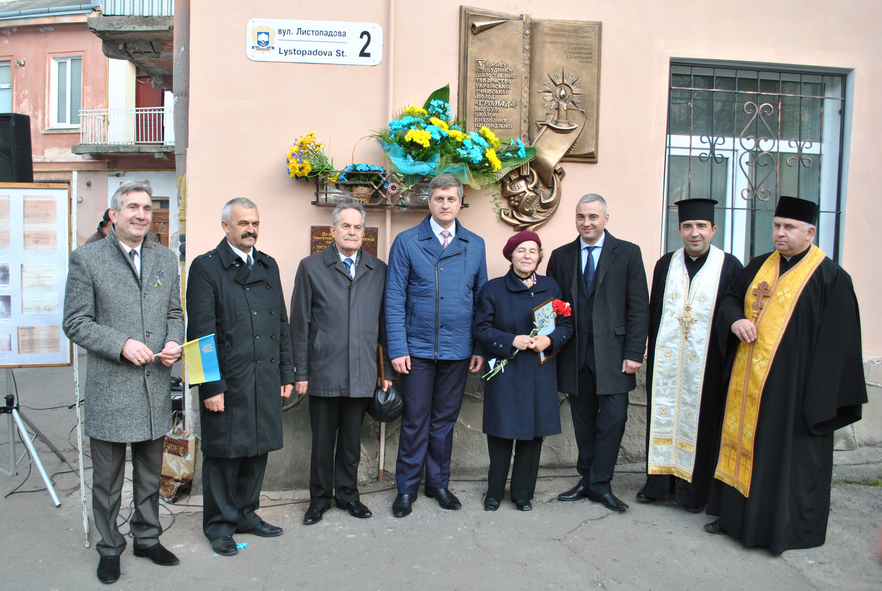 Відкриття першої в Україні меморіальної дошки членам товариства «Громада» на стіні будинку по вул. Листопадовій, 2 у Тернополі. Скульптор Дмитро Пилип'як, архітектор Данило Чепіль. Невідомий, невідомий, Михайло Андрейчин, Олег Сиротюк, Ольга Збожна, Леонід Бицюра, оо. Орест Павліський та Андрій Янішевський.